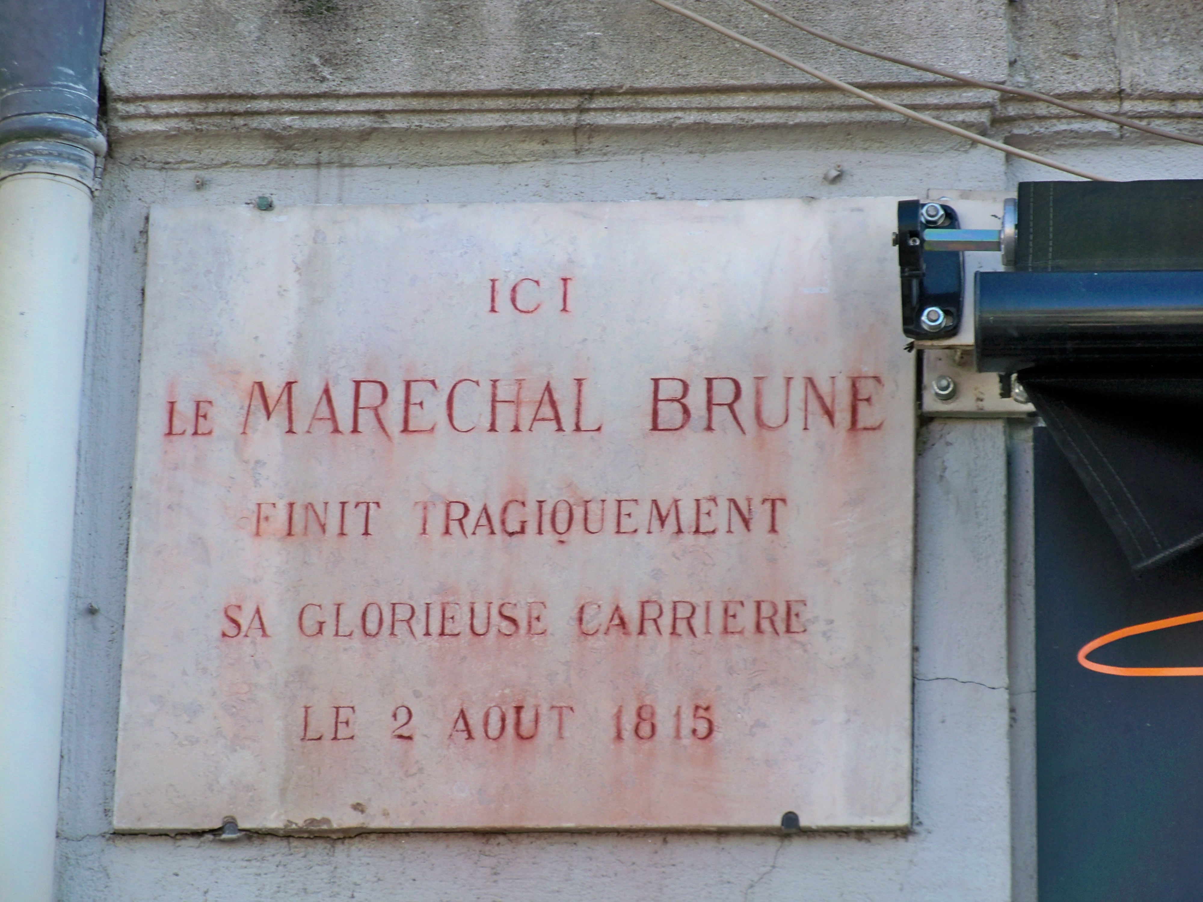 Plaque concernant le décès du Maréchal Brune à Avignon